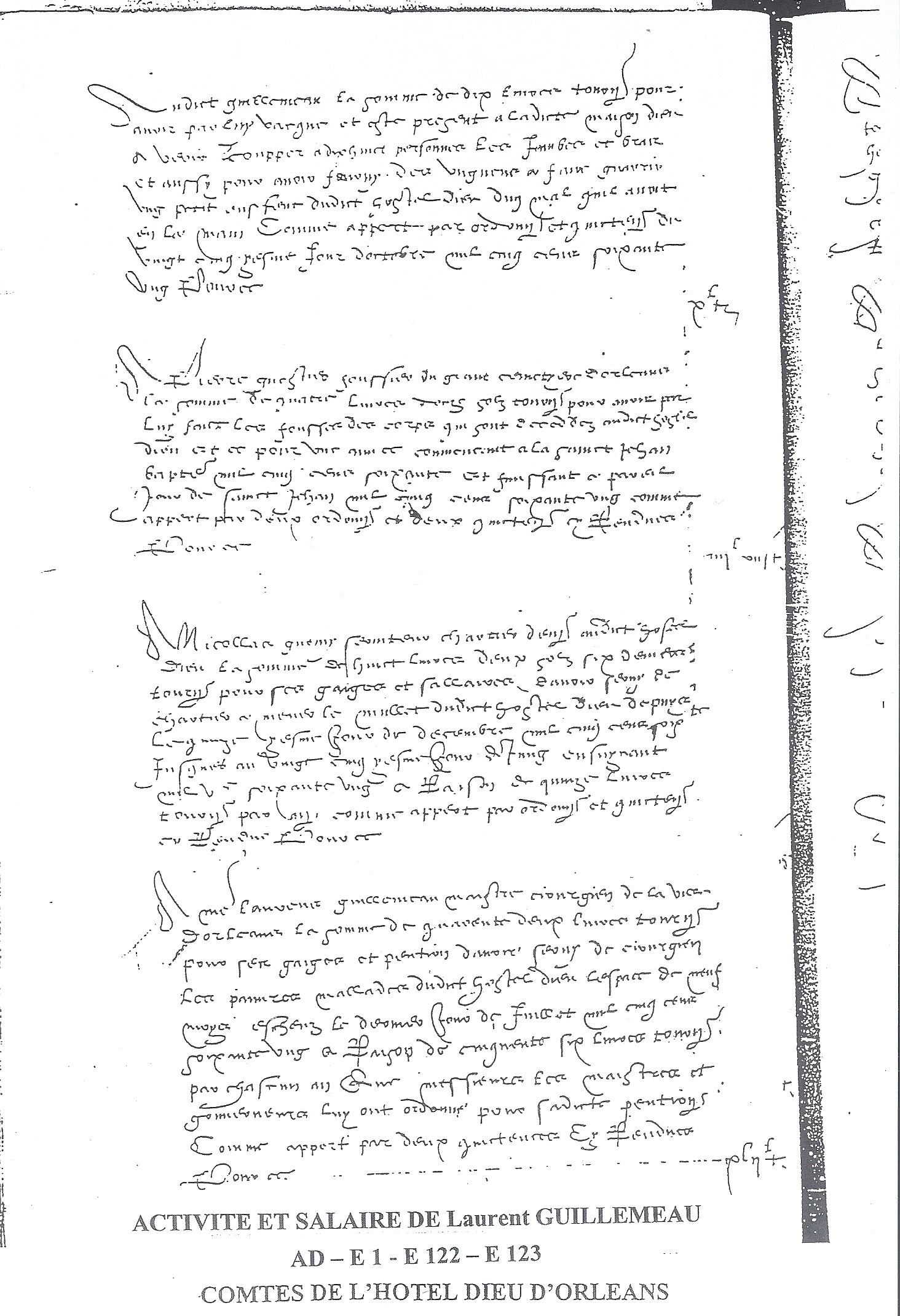 Cet oncle avait, au sein de l'Hôtel Dieu d'Orléans, une intense activité chirurgicale dont témoigne les comptes de l'Hôtel Dieu. Son nom est d'ailleurs, parmi les dix-sept chirurgiens recensés dans cette ville, le plus souvent cité. On peut notamment lire dans ce document : "au dict Guillemeau la somme de dix huit livres Tournoys pour avoir par lui vacqué est présent à la dite Maison Dieu à venir couper à dix huit personnes les jambes et bras et aussi pour avoir fourny les ungueus à faire guéris ung petit enfant du dict Hôtel Dieu d'un mal qu'il avait eu la main comme appert par ordonnance et quittance du 25ème jour d'octobre mil cinq cent soixante ung pour ce".